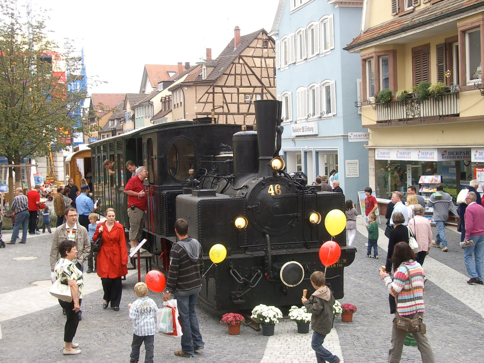 Lokomotive mit ungewöhnlichem Innentriebwerk; hat von 1894 bis 1961 Lahr mit Strasbourg verbunden. Auf historischer Strecke, hier am Urteilsplatz in Lahr, war der originale Zug 2009 ein paar Tage ausgestellt, heute ist er im Kleinbahnmuseum Selfkantbahn